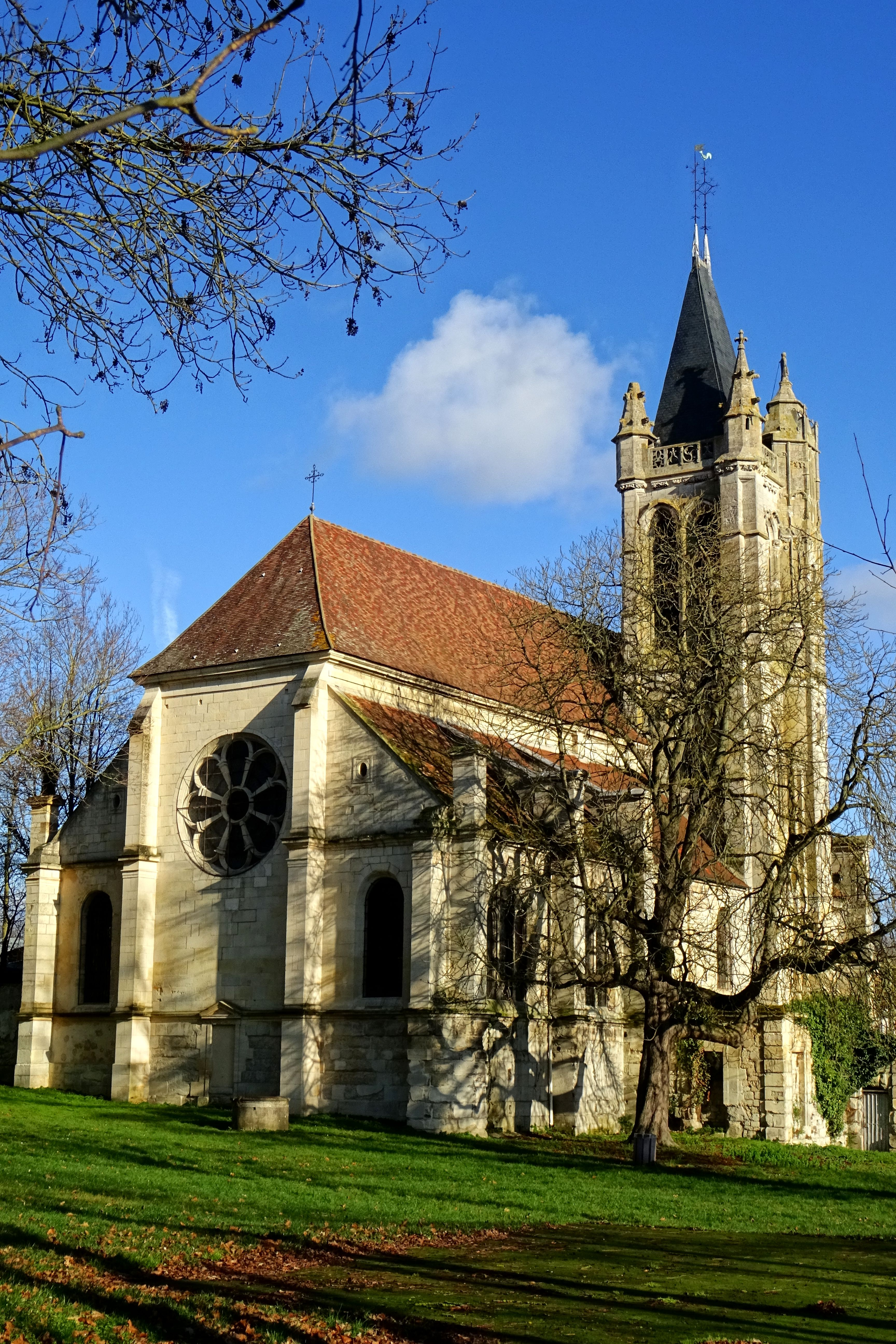 Vue extérieure de l'église - voir le titre du fichier.